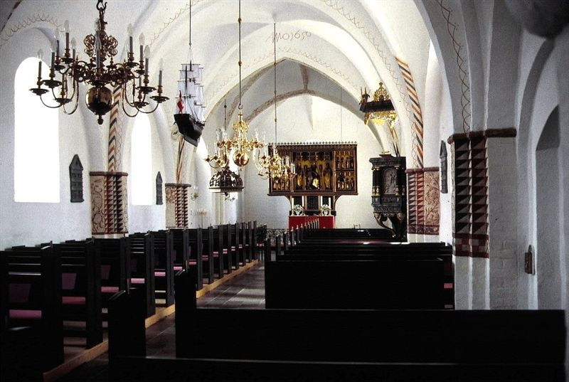 Østbirk Kirke i Danmark. Skibet set mod øst